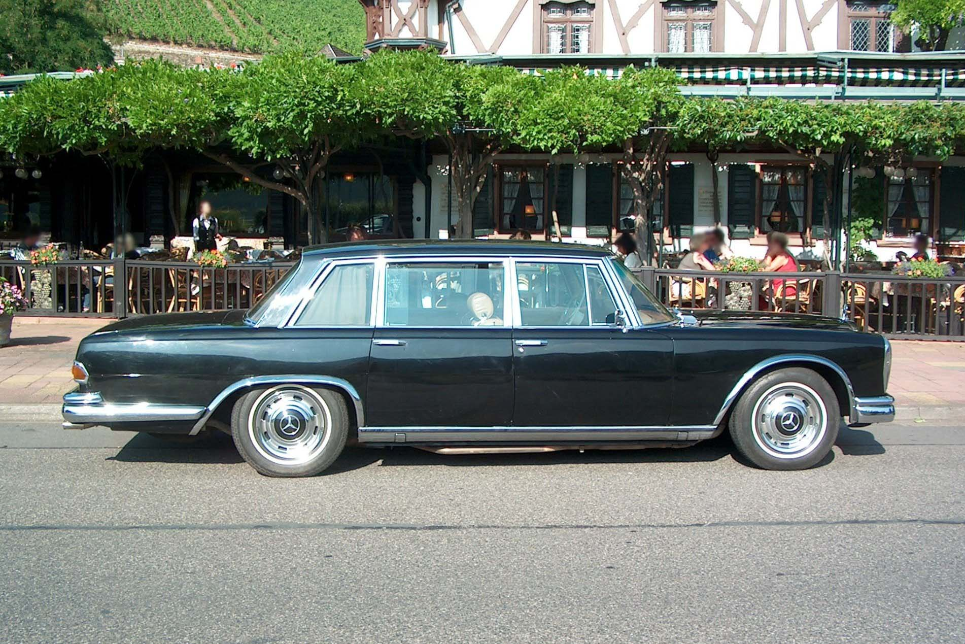 A Mercedes-Benz 600 (W100) in Assmanshausen (Rhine).